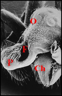 Prosoma d' Argyrodes de type "prognathe" au microscope à balayage